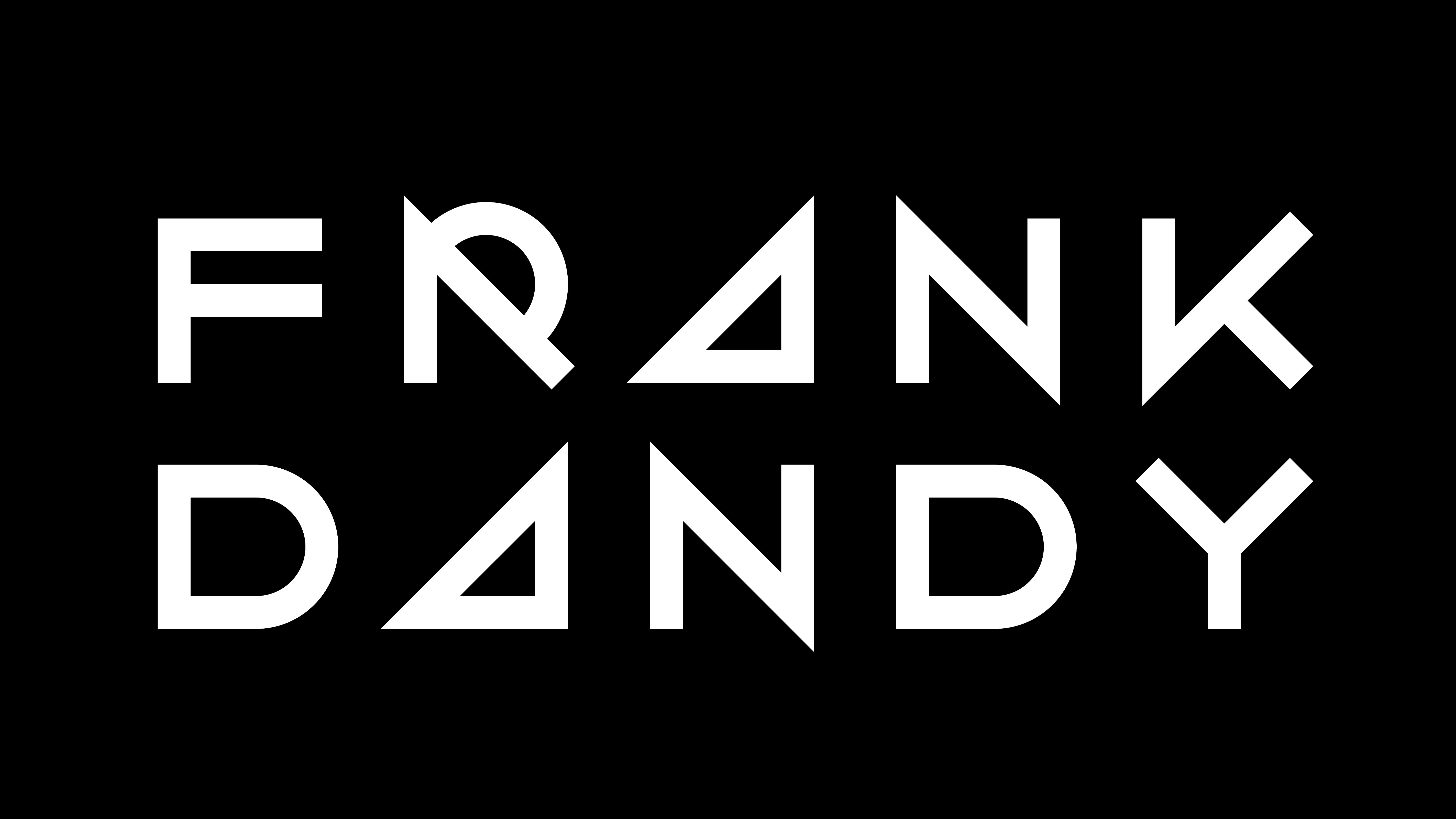 Frank Dandy Logotype 2019